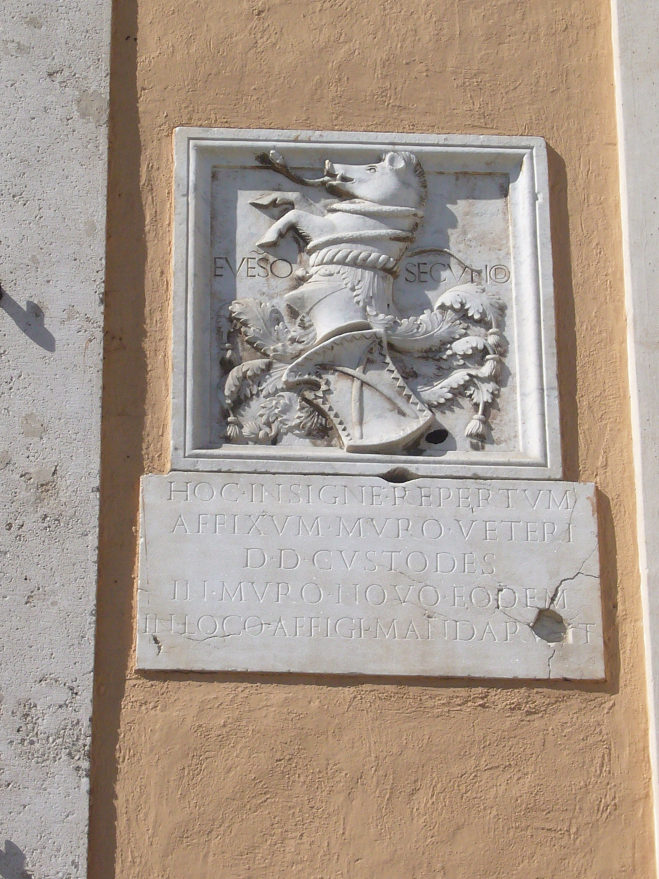 Roma, Ospedale del Salvatore a piazza S Giovanni - stemma di Everso II dell'Anguillara.